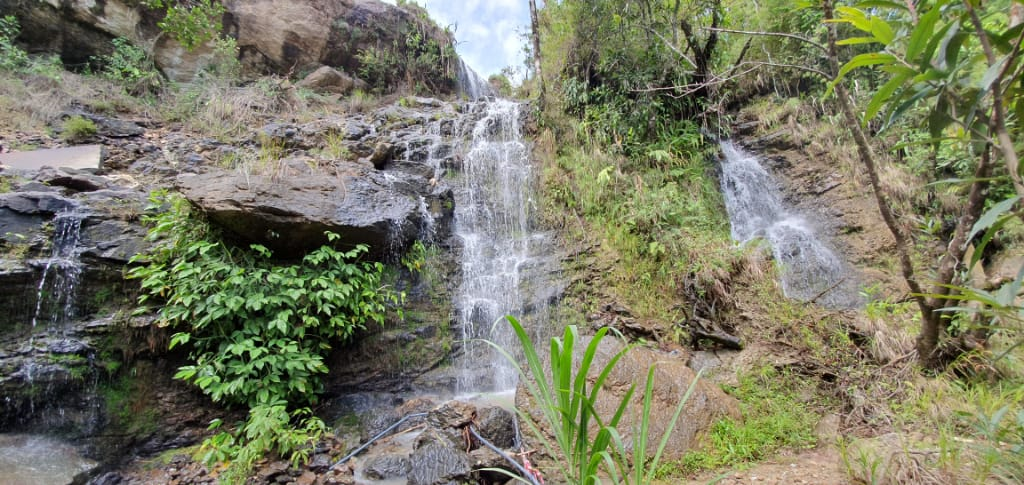 La cascada pertenece a una microcuenca del Carrizal